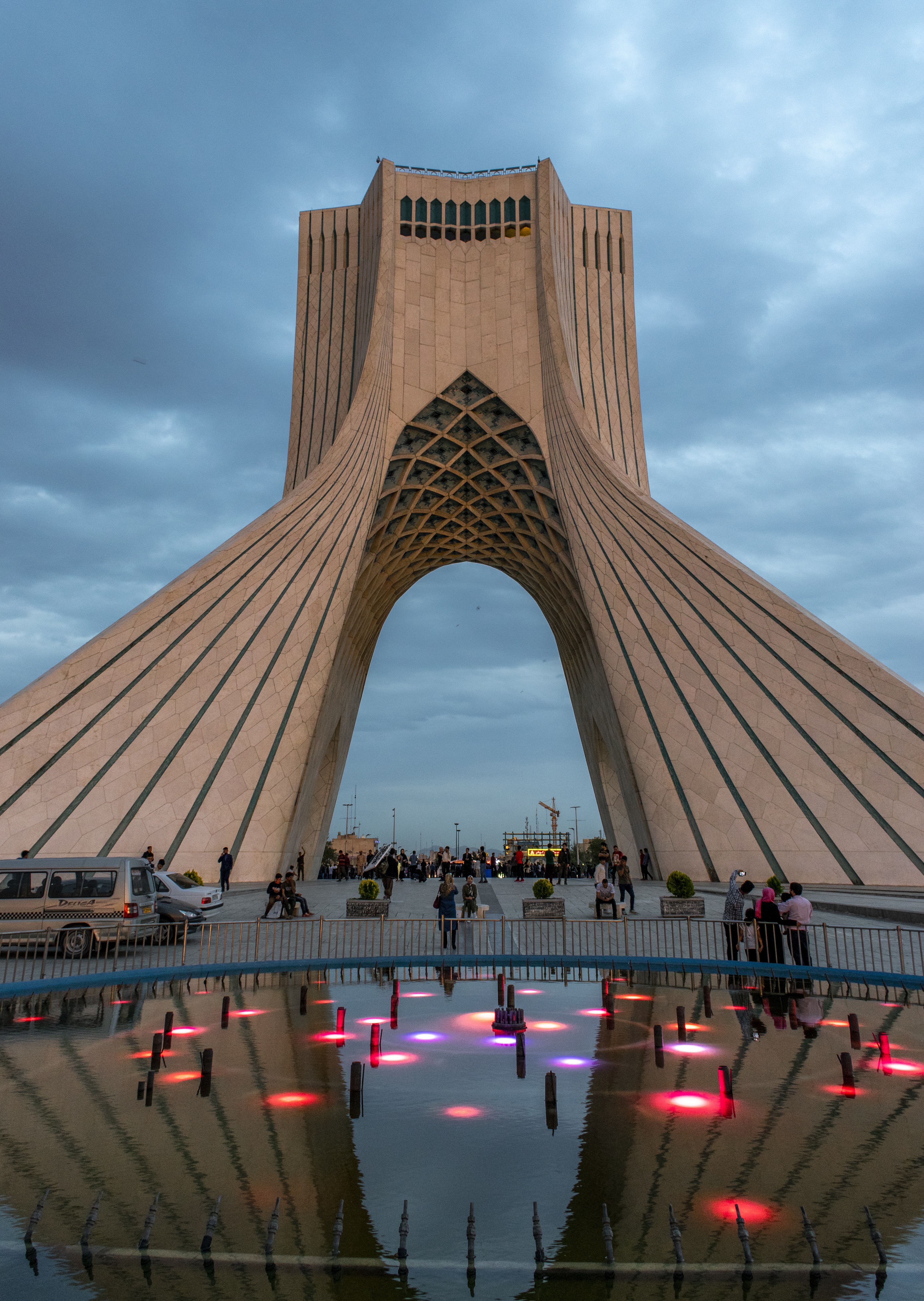 برج آزادی